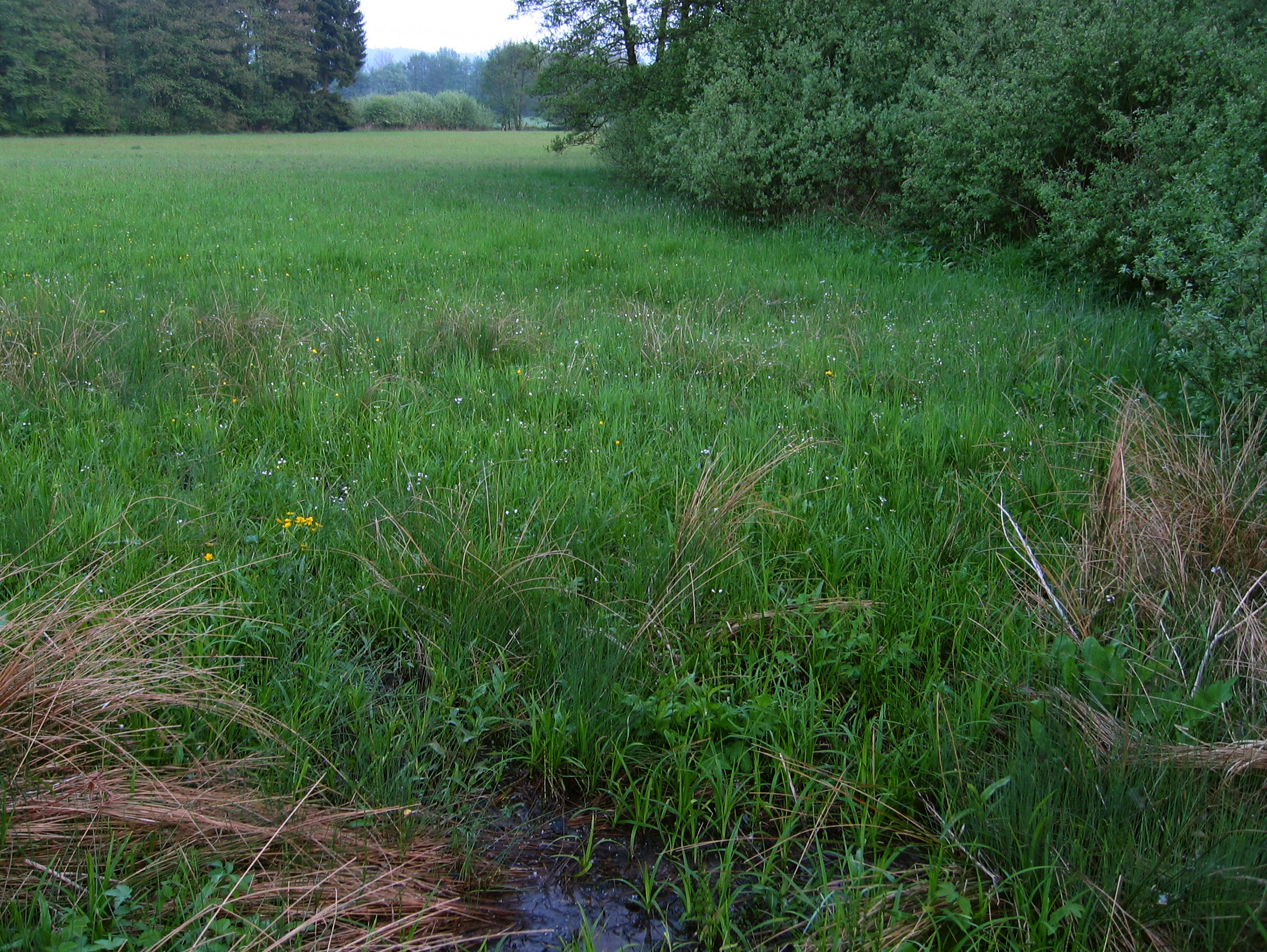 Feuchtwiese und Weidengebüsch im Nordosten des Naturschutzgebiets Satzer Moor, Bad Driburg, Deutschland.